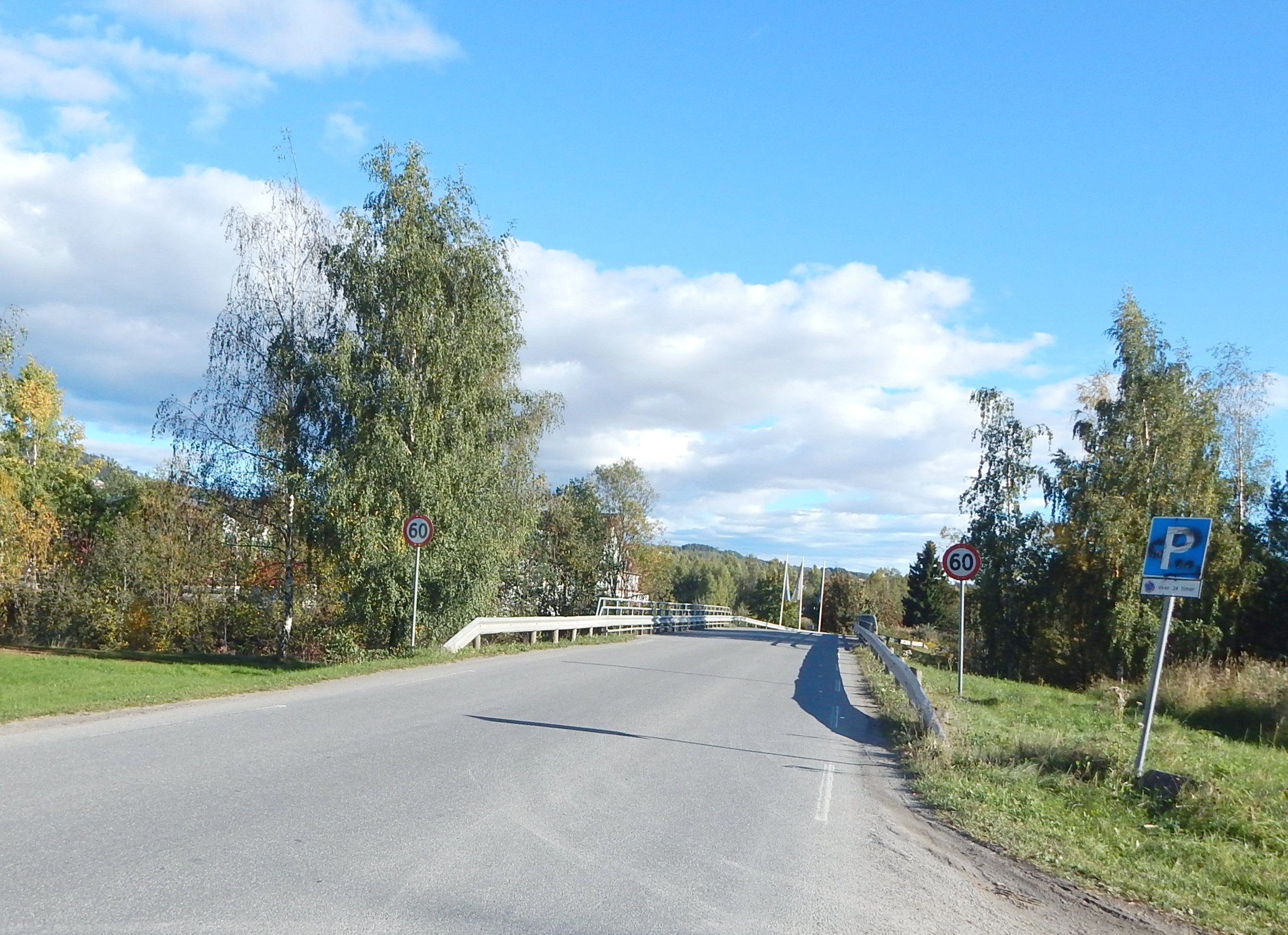 Fylkesvei 1774 (tidl. 89) krysser Brumunda.